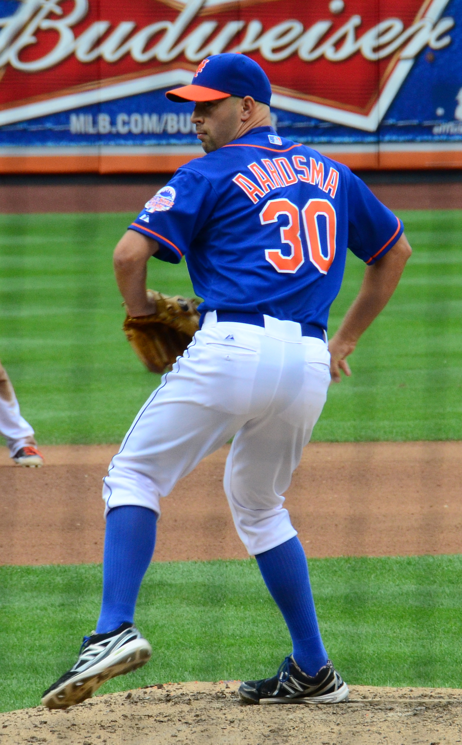 David Aardsma